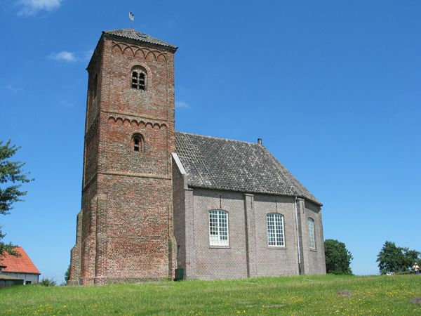 Kerk in Spaarnwoude, thans in gebruik voor concerten en als expositie ruimte